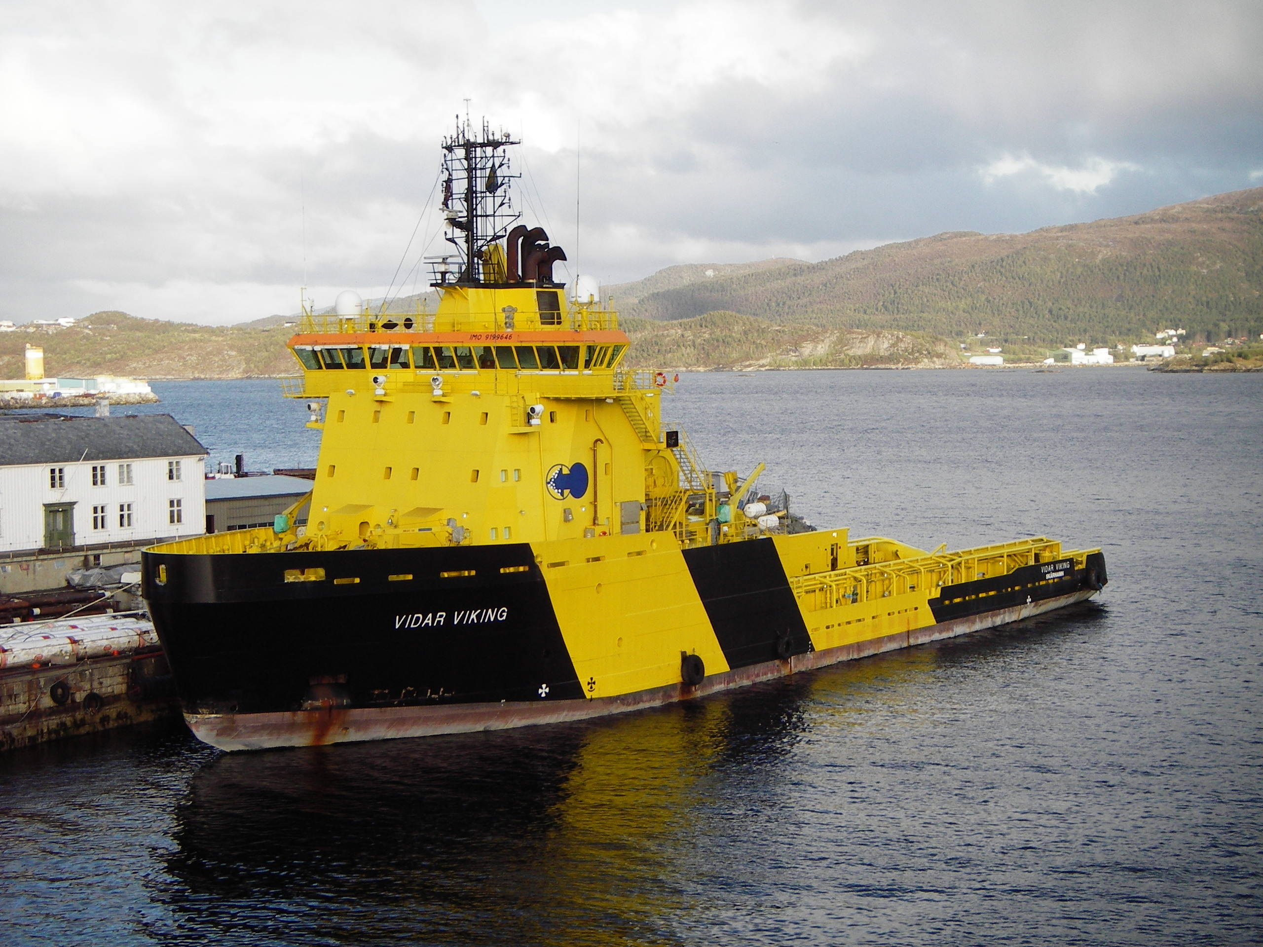 Vidar Viking in Kristiansund 2005 IMO Number: 9199646 MMSI Number: 265835000 Callsign: SLKD Length: 84 m Beam: 18 m